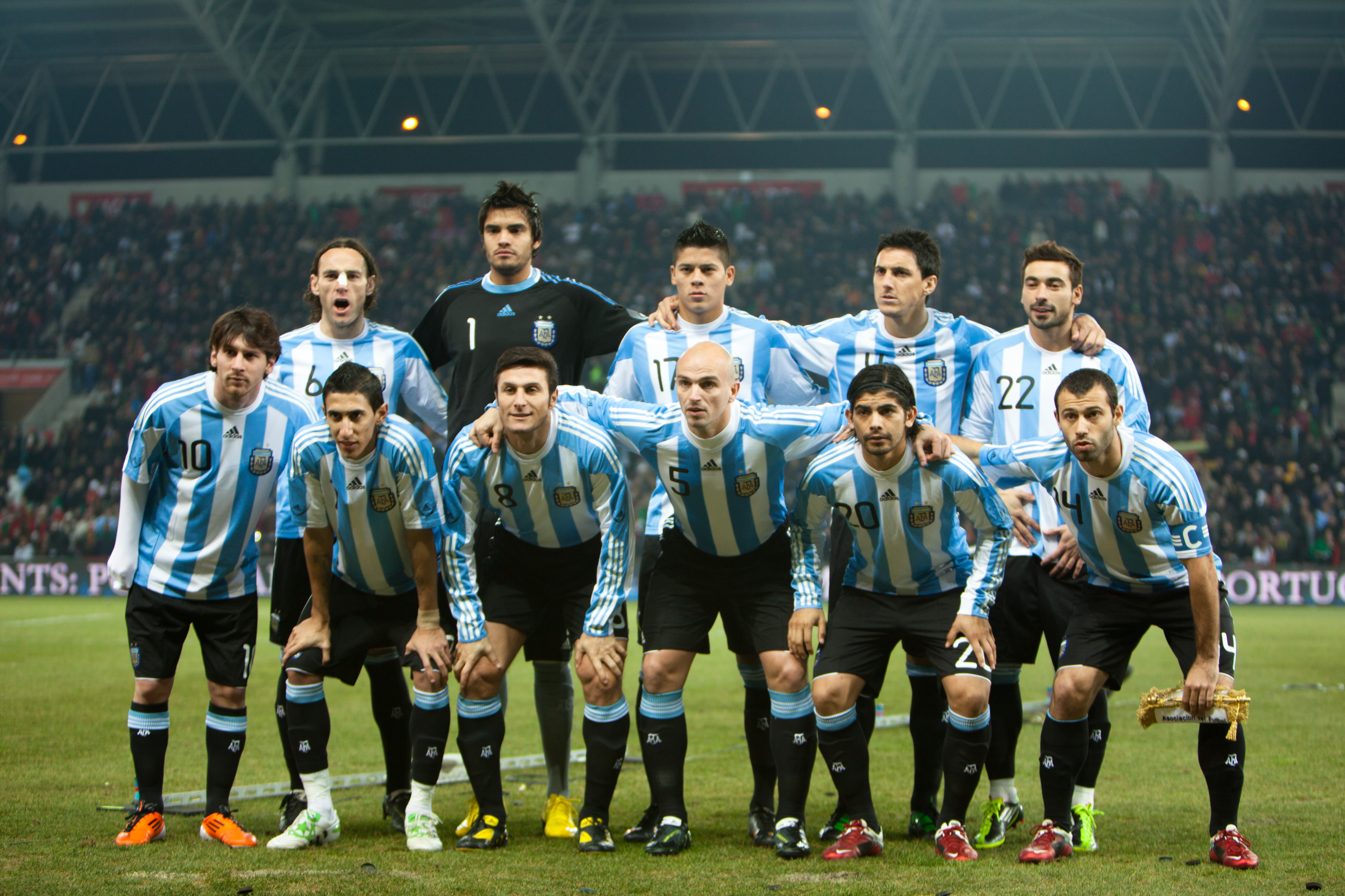 Equipe d'Argentine de football, match amical contre le Portugal.